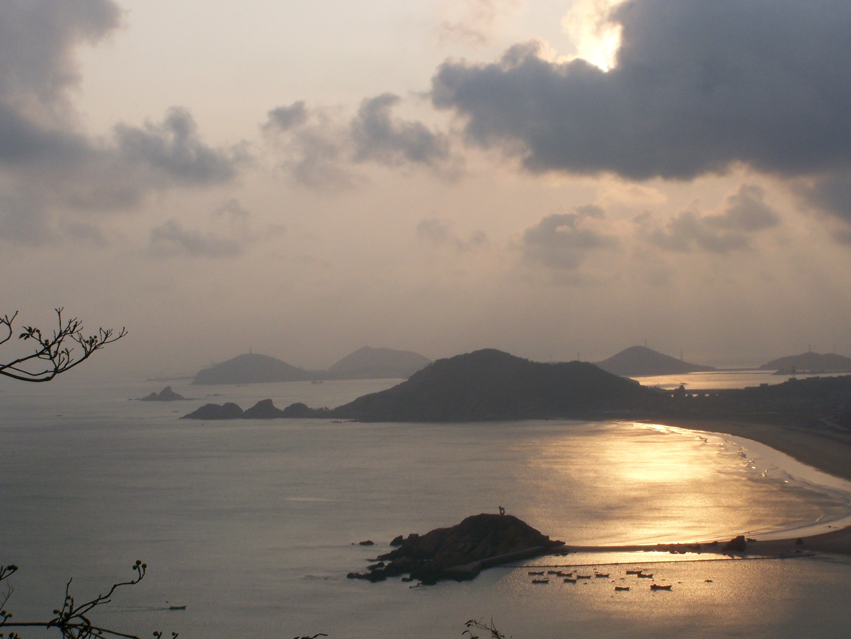 ShengSiLieDao,XiZhao